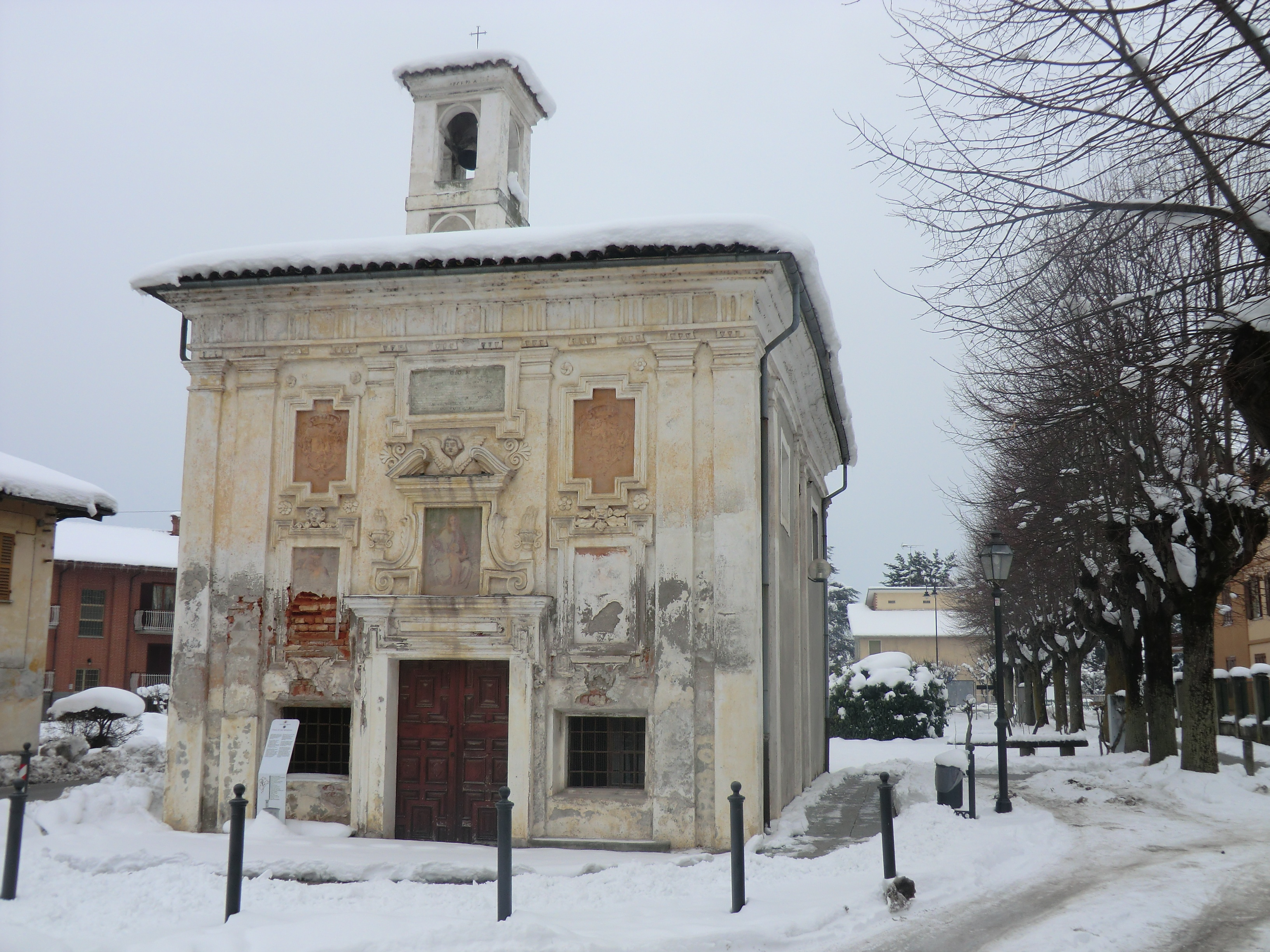 Bene Vagienna (Cuneo): chiesa di San Sebastiano (sec. XVII)